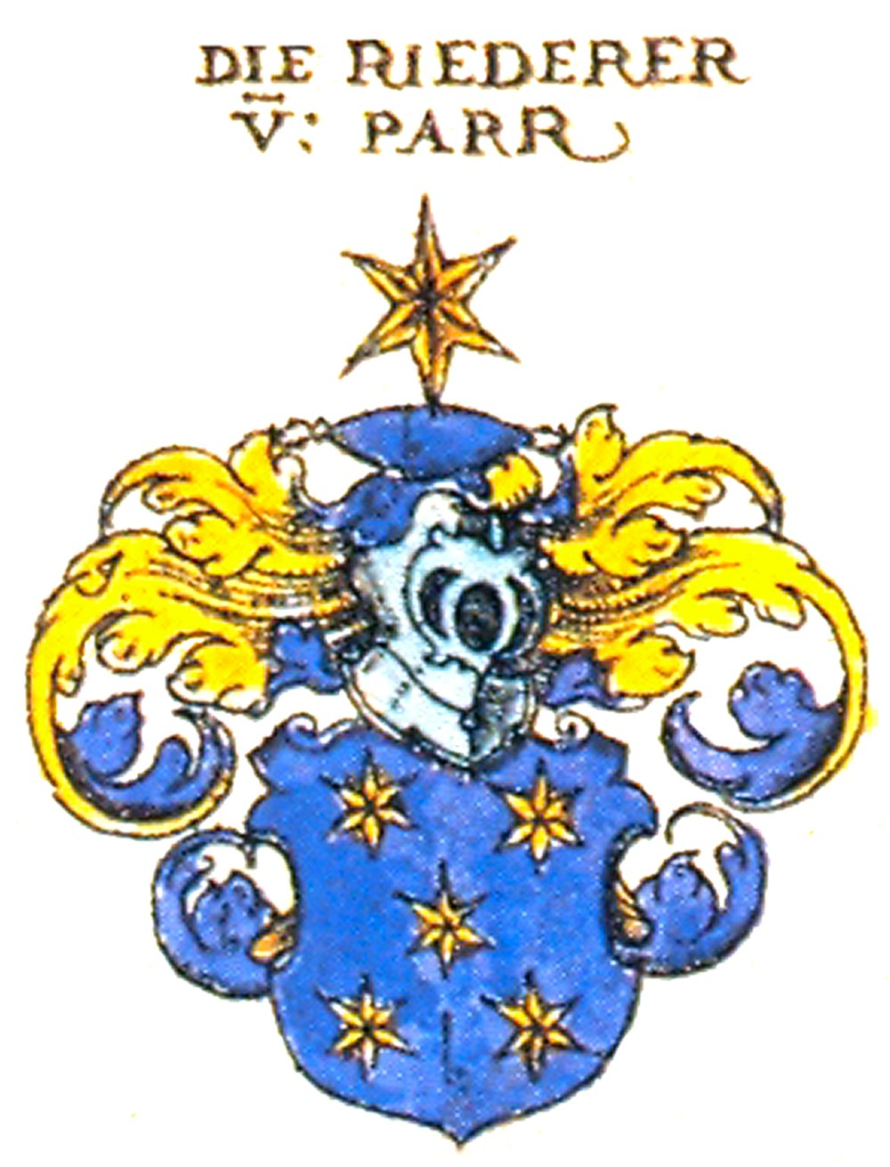 Wappen des Bayerischen Adelsgeschlechts Riederer von Paar